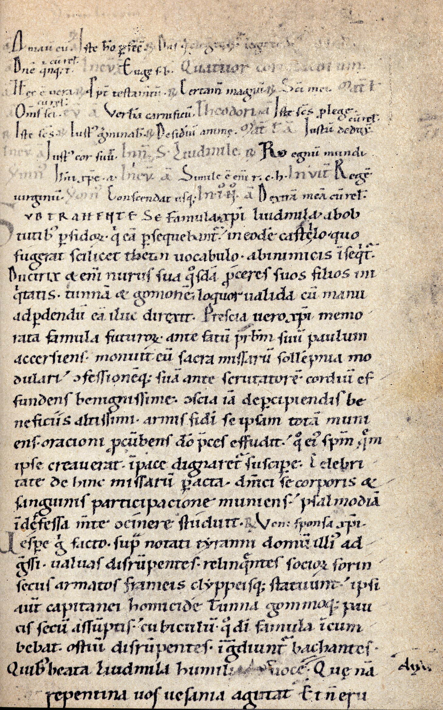 1. page of a medieval manuscript (12. century) Česky: První strana z rukopisu Rajhradského breviáře z poloviny 12. století (Breviář Rajhradský, nyní UK v Brně, sign. sign. R 387, (fo 100 r - 101 v, "Wattenbachova legenda" = 4. kapitola Kristiánova), polovice 12. století).